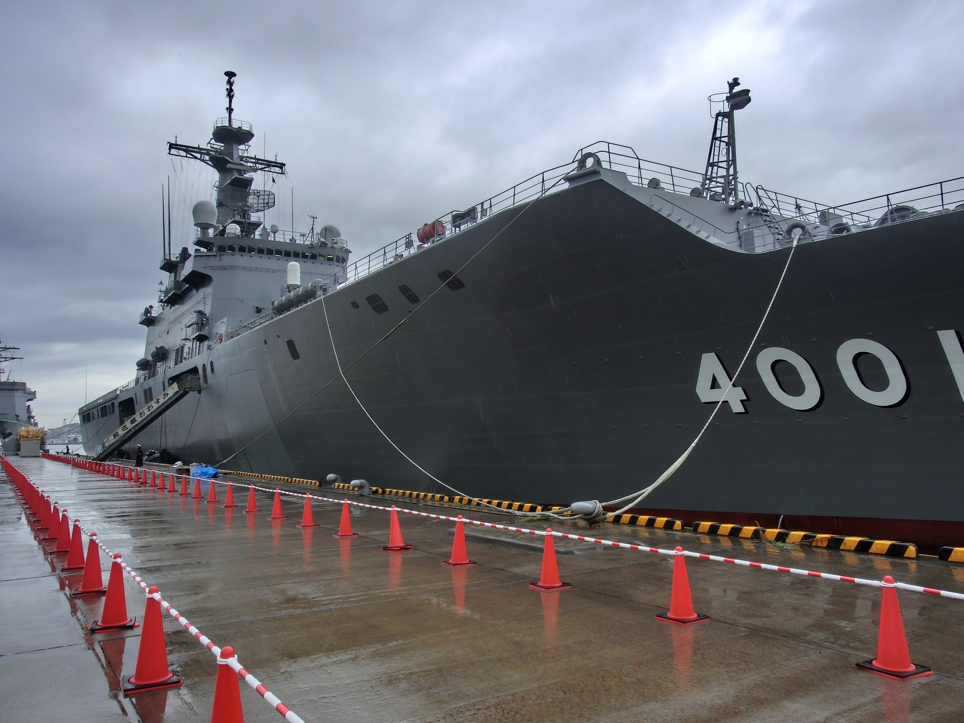 呉・Dバースに停泊中の輸送艦おおすみ。前日に続いて雨天中止となった平成25年度呉地方隊展示訓練にて。